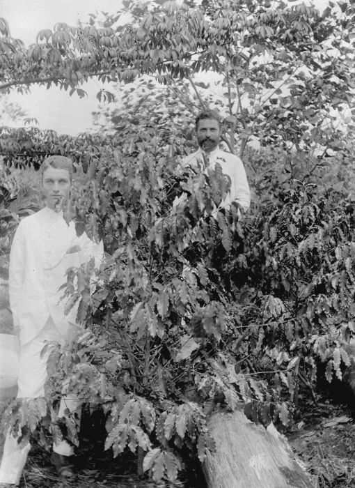 Foto. Twee planters bij een Java-koffiestruik van 1896/97 in tuin 'B', cultuuronderneming Kedongdong of Way Lima, Lampongse Districten, Zuid-Sumatra.